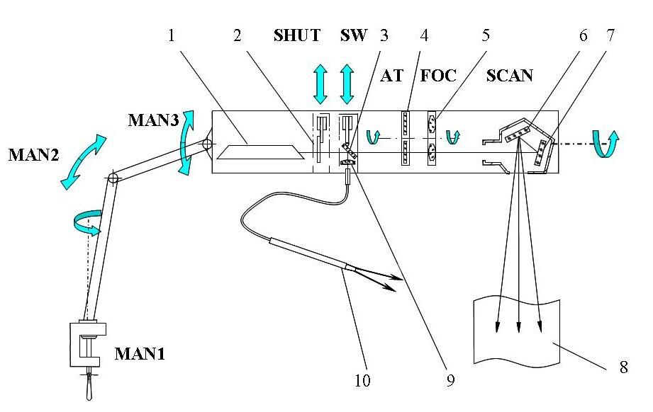 Схема портативного лазерного терапевтичного апарата сканера медичного СМ-2 виробництва ТОВ "Ніжинські лабораторії скануючих пристроїв". рисунок для статті Сканер медичний СМ-2. Nizh Labs of Scannig - 74